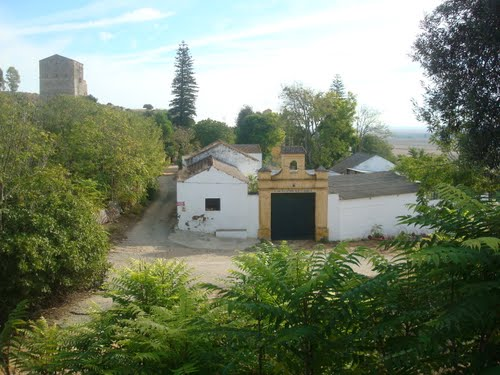 Cortijo Los Llanos de Gandul